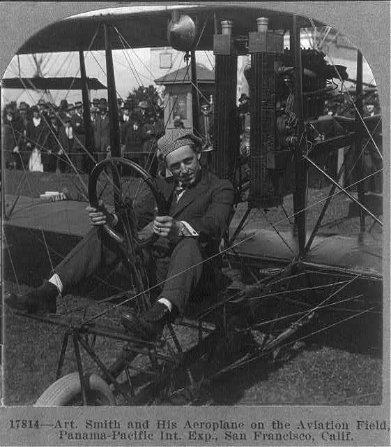 Art Smith